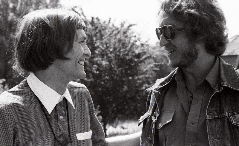 Lezsák Sándor és Zalán Tibor a Lakiteleken rendezett Fiatal Írók Találkozóján 1979-ben.